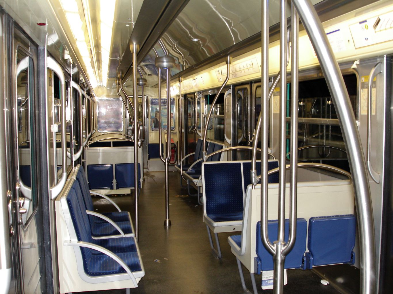 Intérieur d'une rame MF67 - Ligne 3 du métro parisien - 2006 Photo personnelle de clicsouris